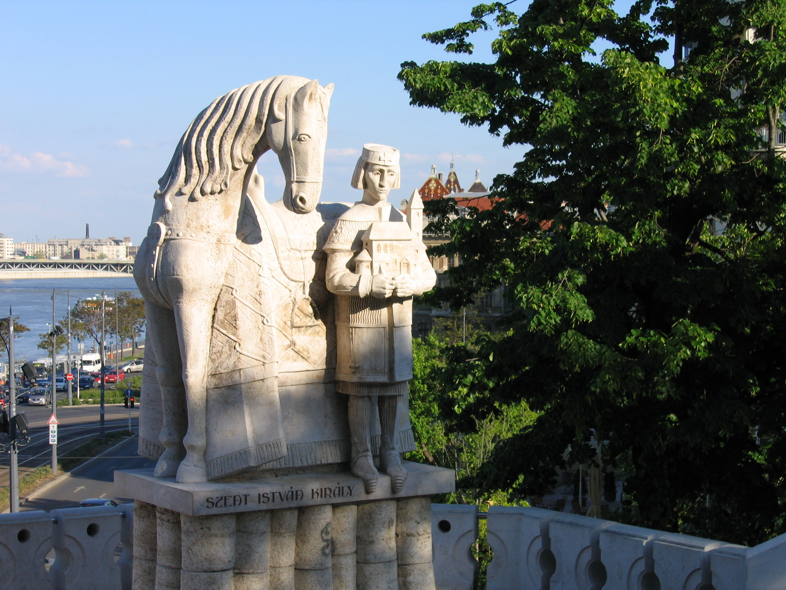 Gellért Hill ((Gellérthegy)) Budapest, Hungary